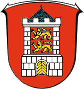 Wappen von Bad Camberg